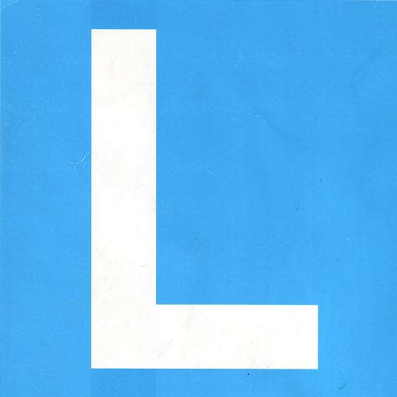 L-Übungsfahrt für Führerscheinausbildung in Österreich und in der Schweiz